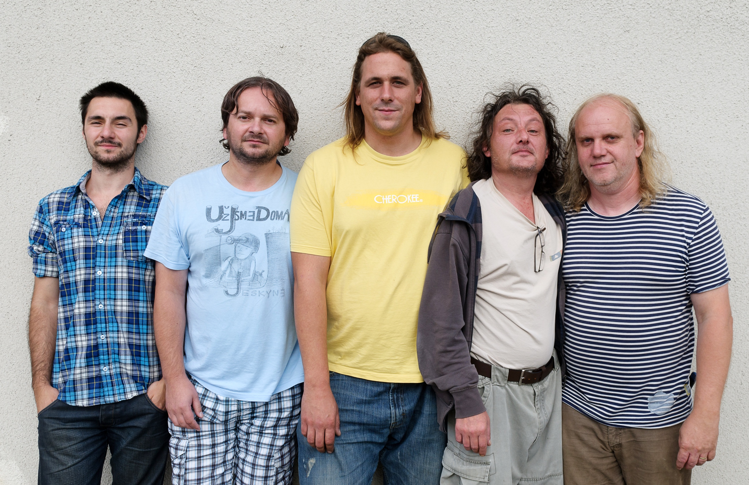 Fotka kapely. Zprava: Jaroslav Noga(Bicí), Pepa Červinka (basa), Adam Tomášek (trumpeta), Martin Velíšek (štětce), Miroslav Wanek (kytara, piáno, zpěv, text, hudba)